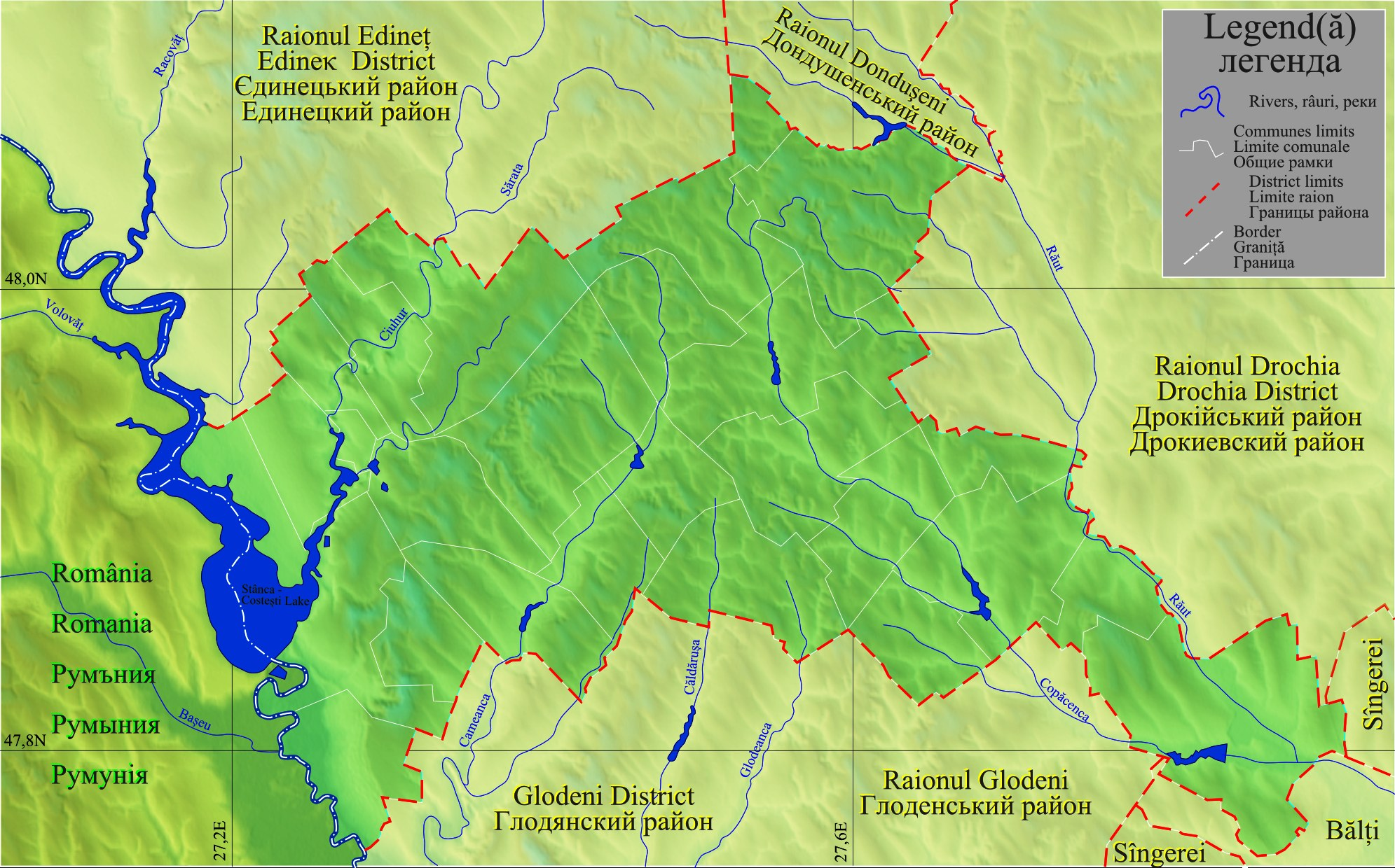 Harta de localizare Moldova Riscani local.